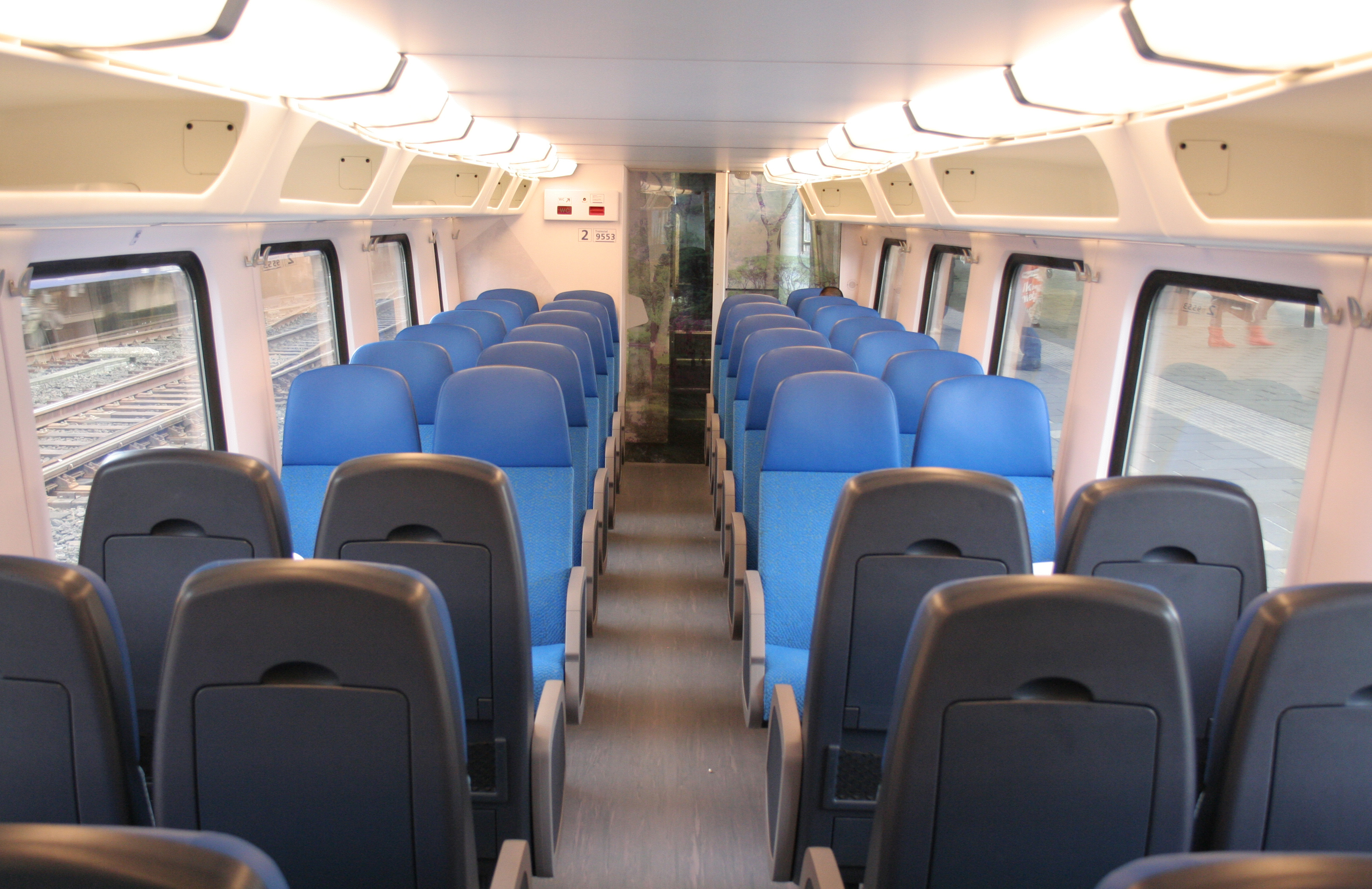 Interieur nieuwe VIRM 2e klasse